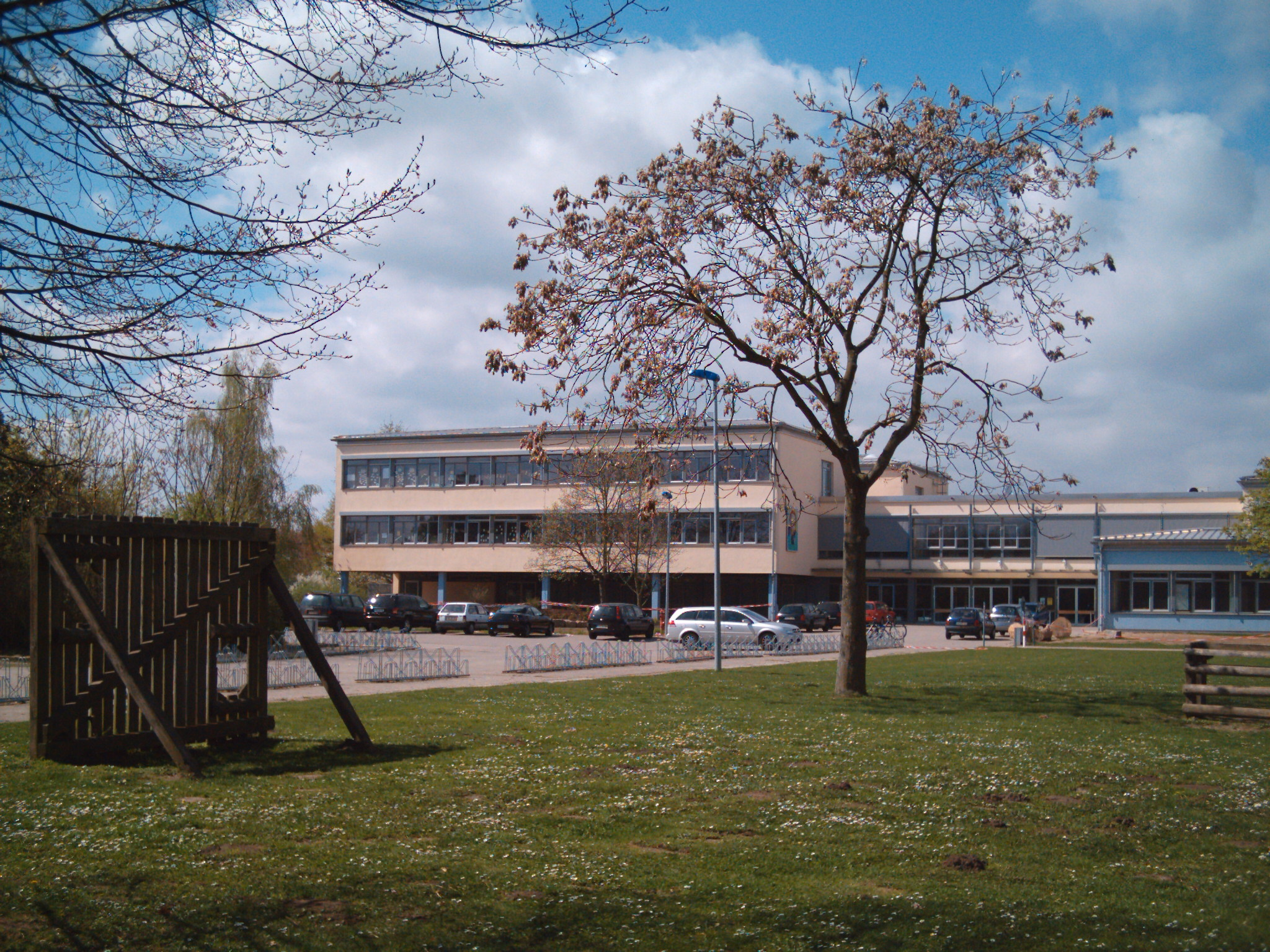 Martin-Buber-Schule in Groß-Gerau, Germany.